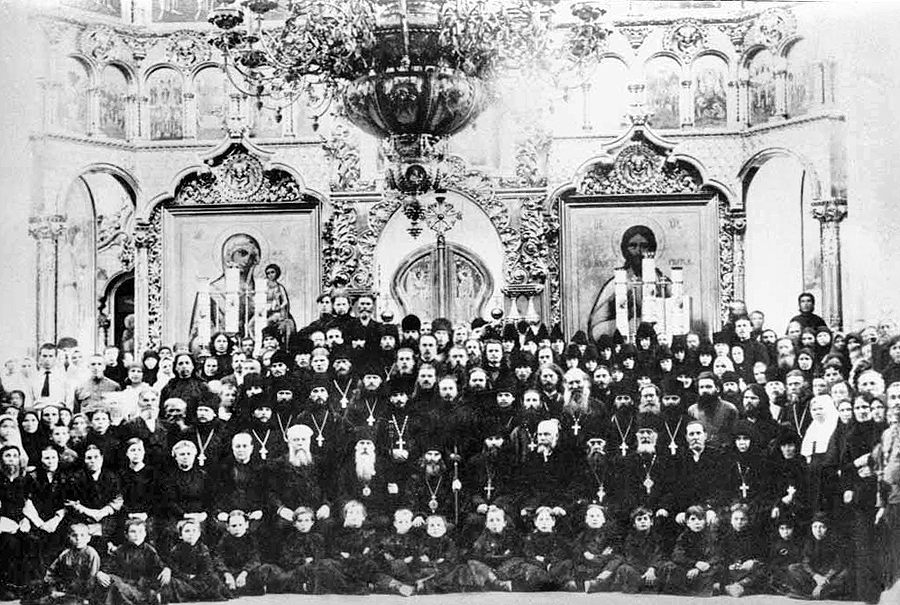 Архиепископ Андроник (Никольский) и Епископ Феофан (Ильминский) Пермские на празднике в Белогорской обтители 1917-1918